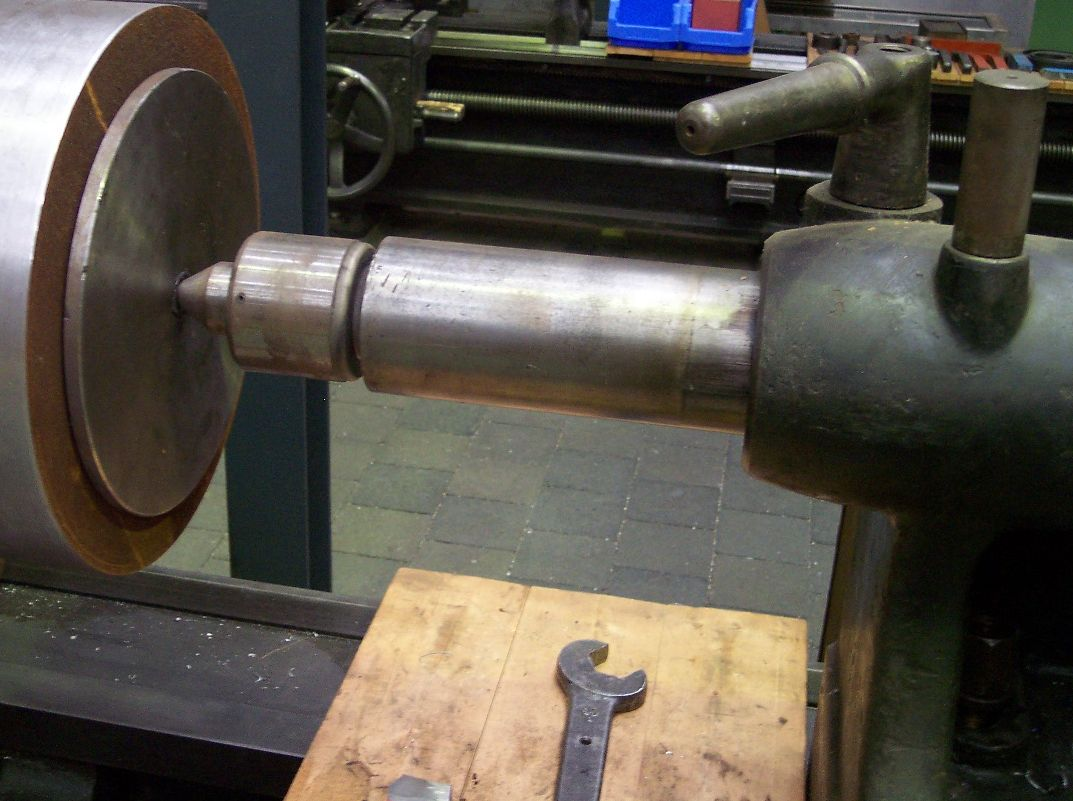 Pinole oder Spindel eines Reitstocks mit mitlaufender Reitstockspitze.